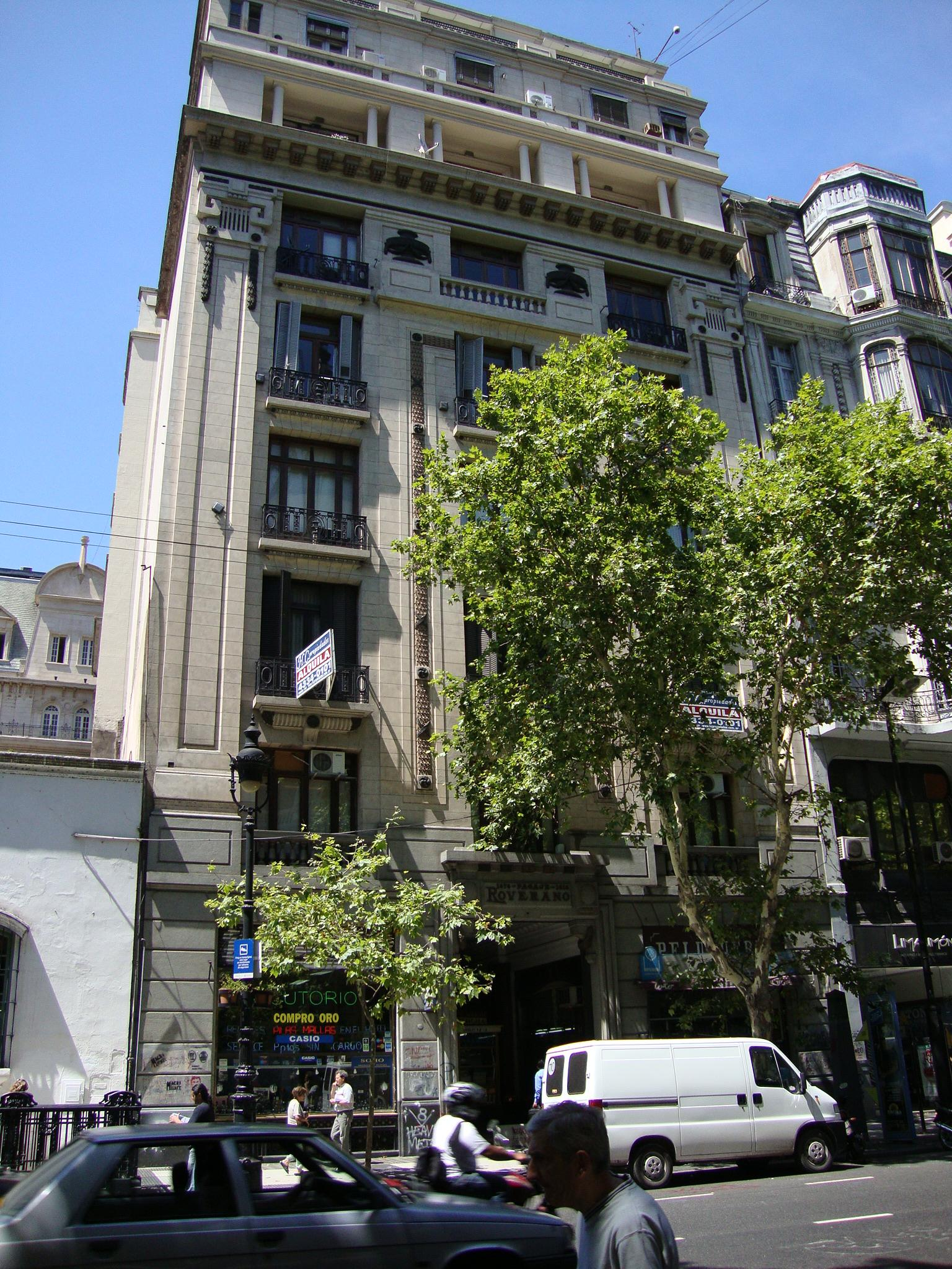 Frente sobre la Avenida de Mayo del Pasaje Roverano (año 1918).